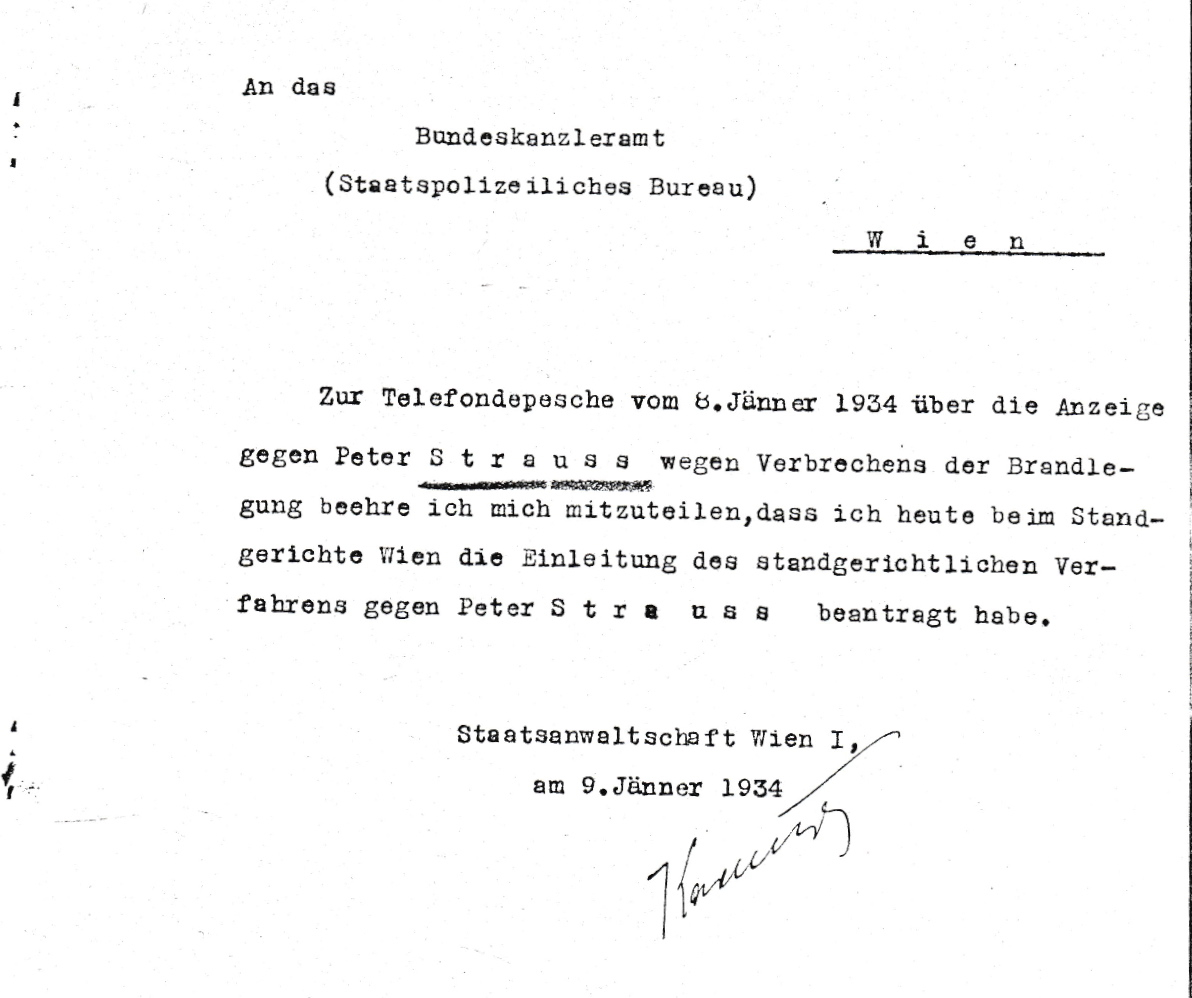 Benachrichtigung der Staatsanwaltschaft Wien bezüglich der Einleitung des Standgerichtsverfahrens gegen Peter Strauß.